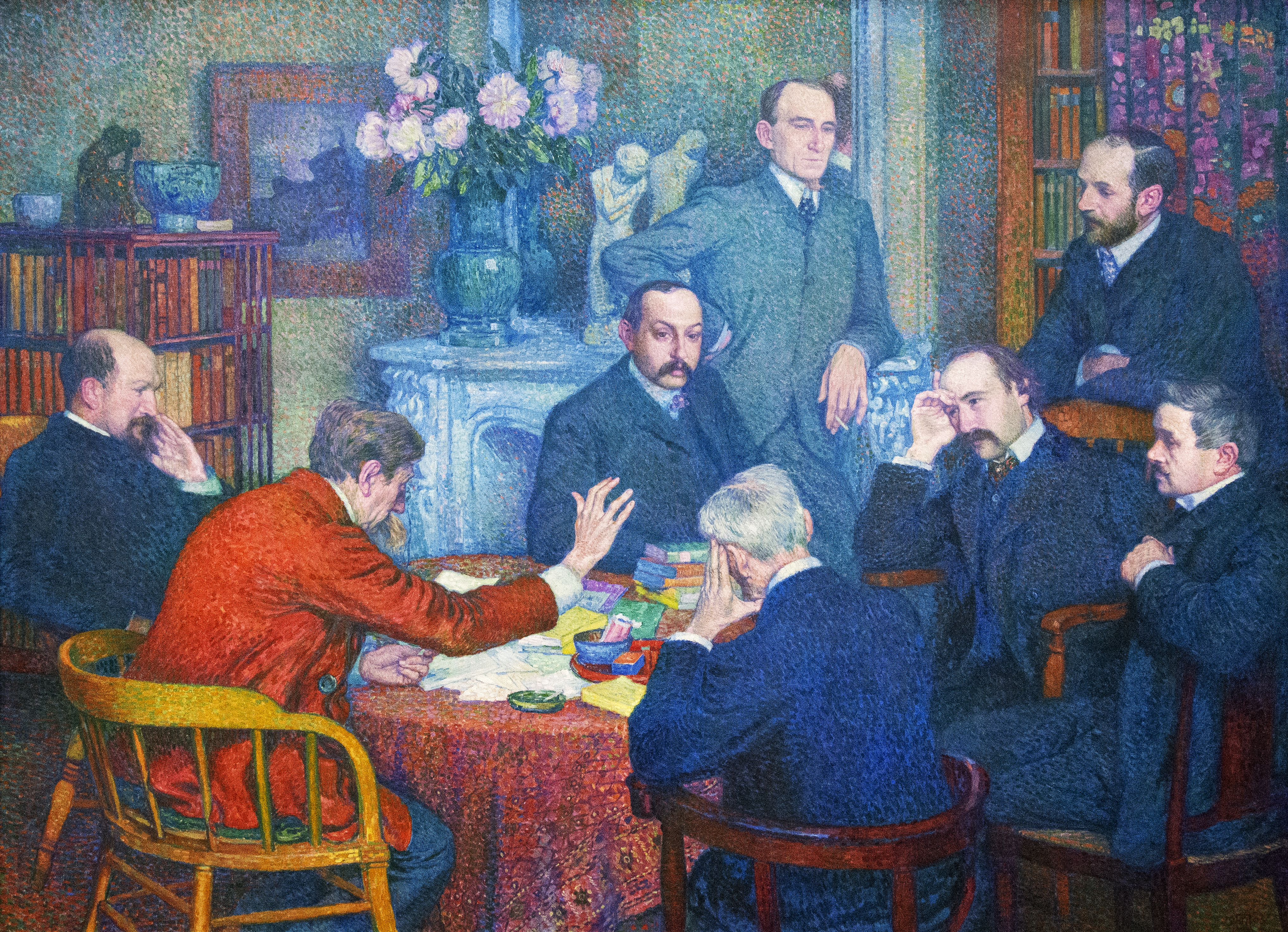 Théo van Rysselberghe (1862-1926) De lezing door Emile Verhaeren (1903) - MSK Gent